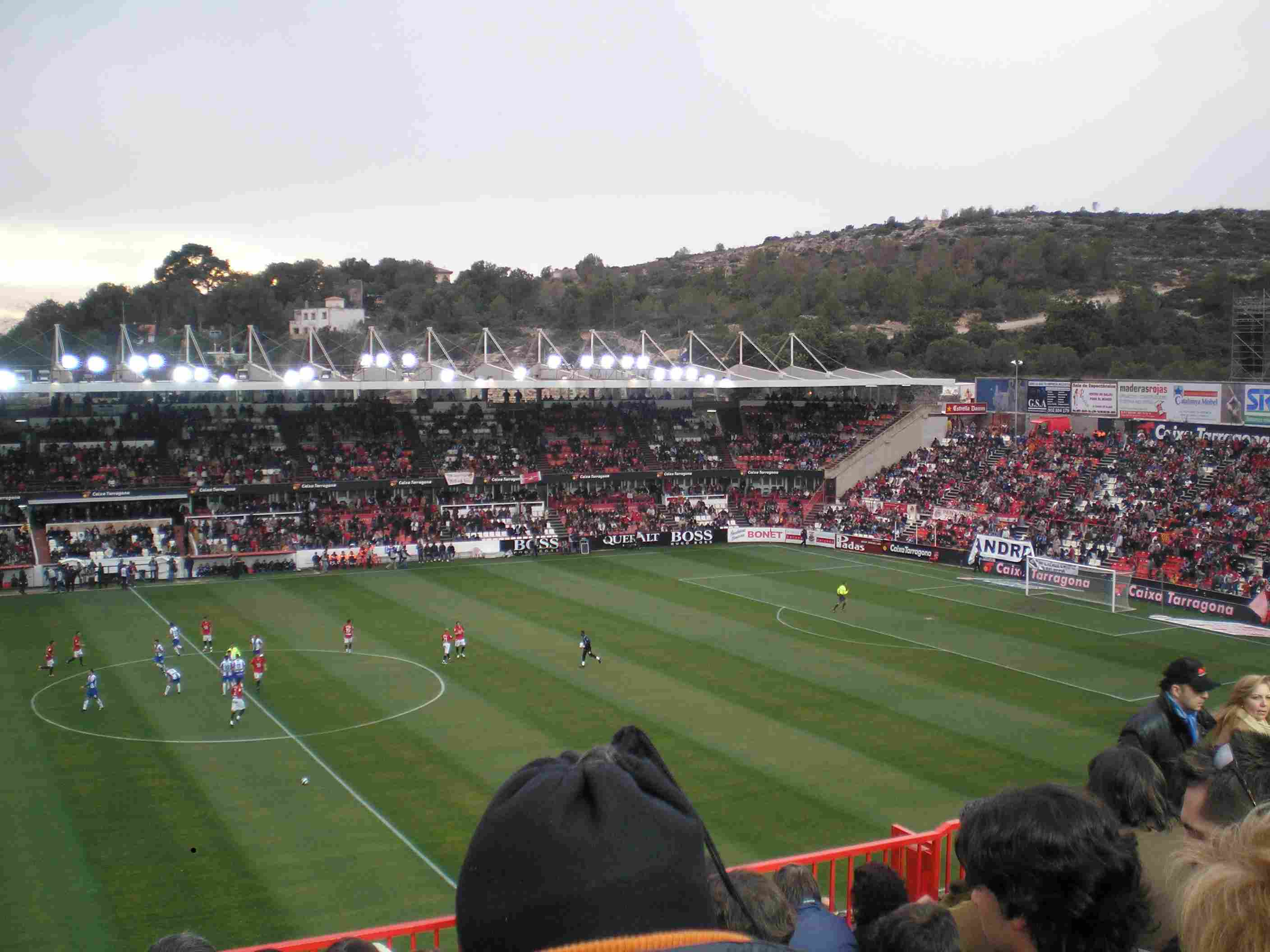 Imatge de l'interior del Nou Estadi de Tarragona, on juga els seus partits el Gimnàstic de Tarragona.